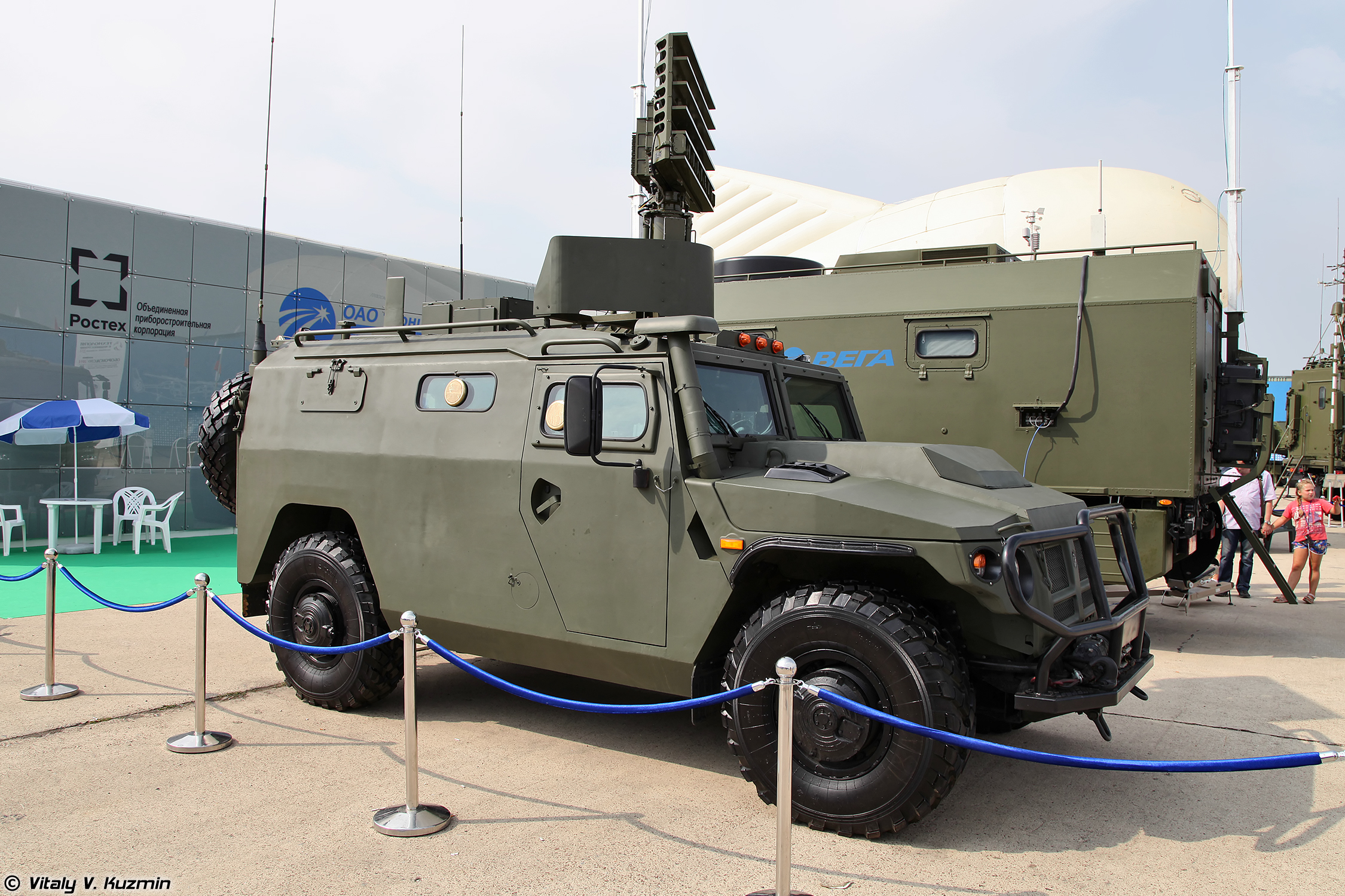 Модуль управления ПВО на шасси ГАЗ Тигр-М (Air defence command vehicle on GAZ Tigr-M chassis)